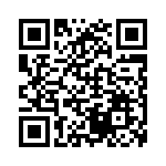 QR-код со ссылкой на статью о QR-кодах русской википедии.